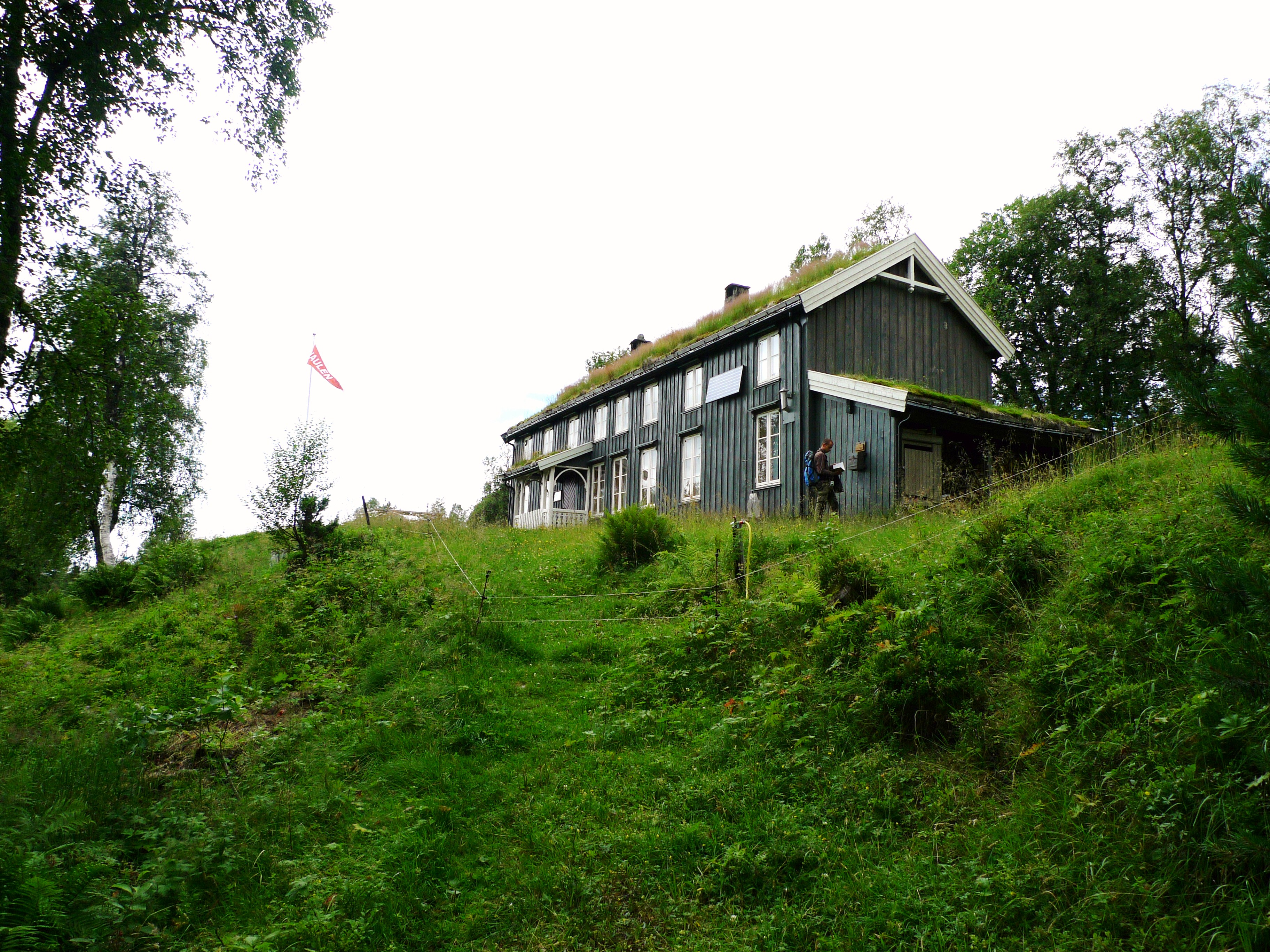 Markagården Vaulen i Surnadal kommune.